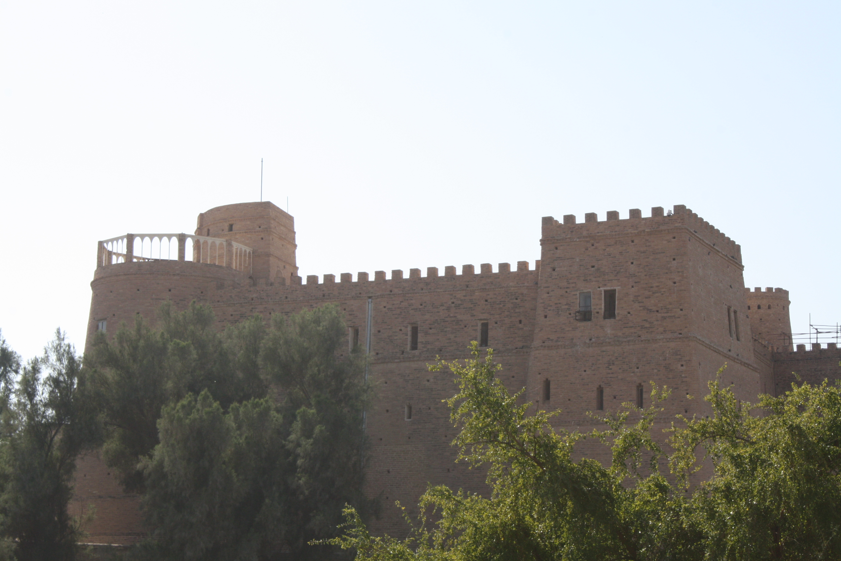 Сузы (Иран). Французская крепость Гришмана. 19 век. Построена с использованием материала из руин дворца Дария (Ападана).